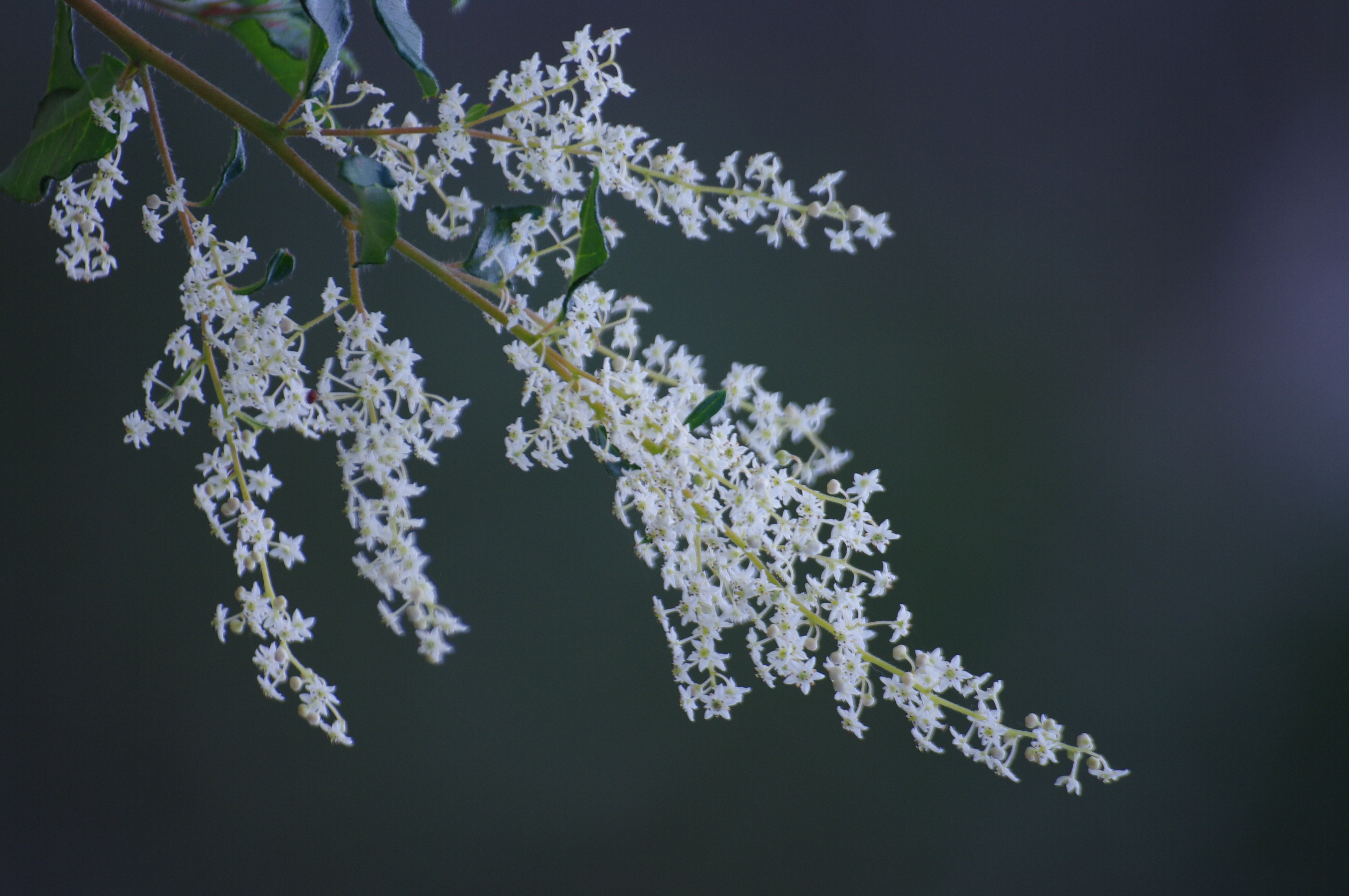 Trymalium odoratissimum